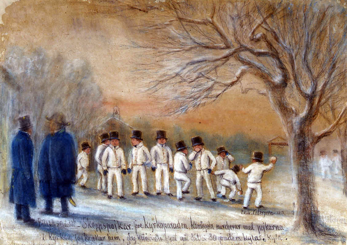 Skeppsholmskyrkan var på den tiden inhyst i ett af varvets förrådshus, i de s.k. fundamenten där hvarest Segel- och Takelkammare befinna sig.